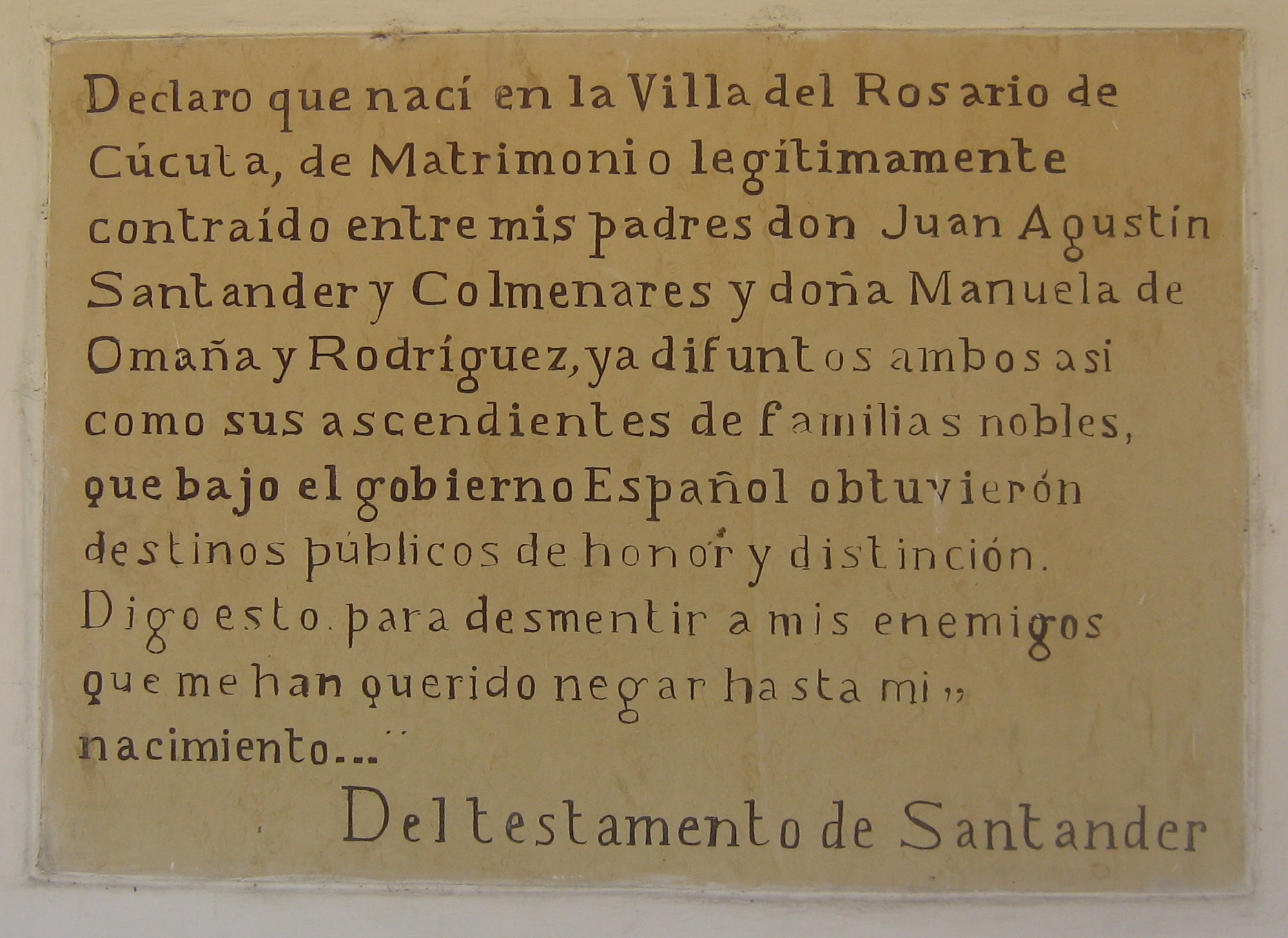 Testamento de Francisco de Paula Santander